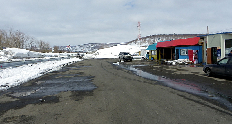 Osada Sokocz (Сокоч) na Kamczatce (rejon jelizowski)